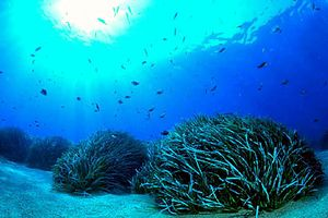 Canali di intermatte di una prateria di Posidonia oceanica